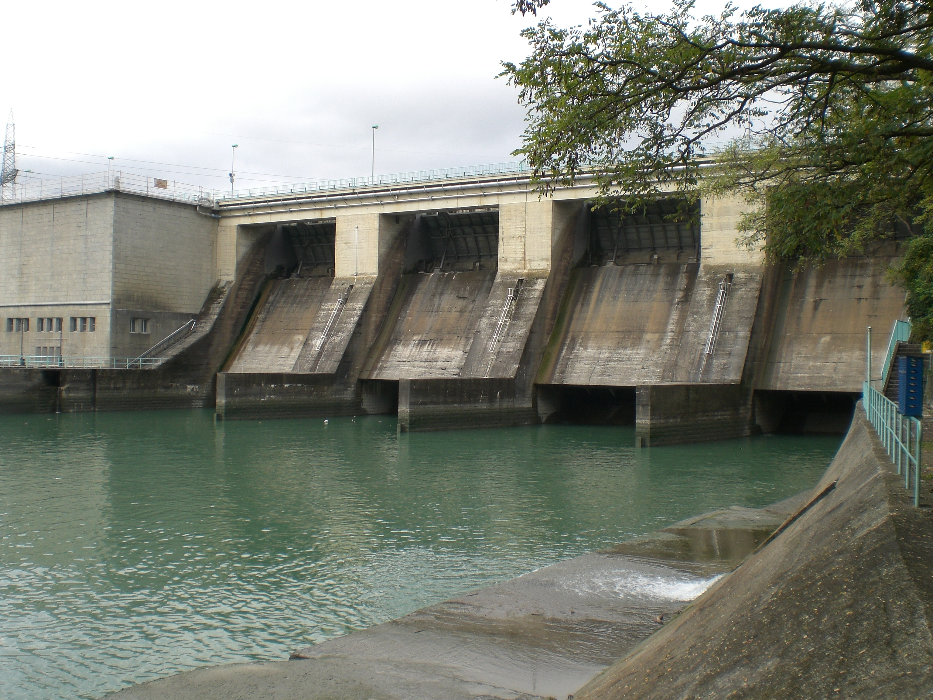 Barrage de Verbois